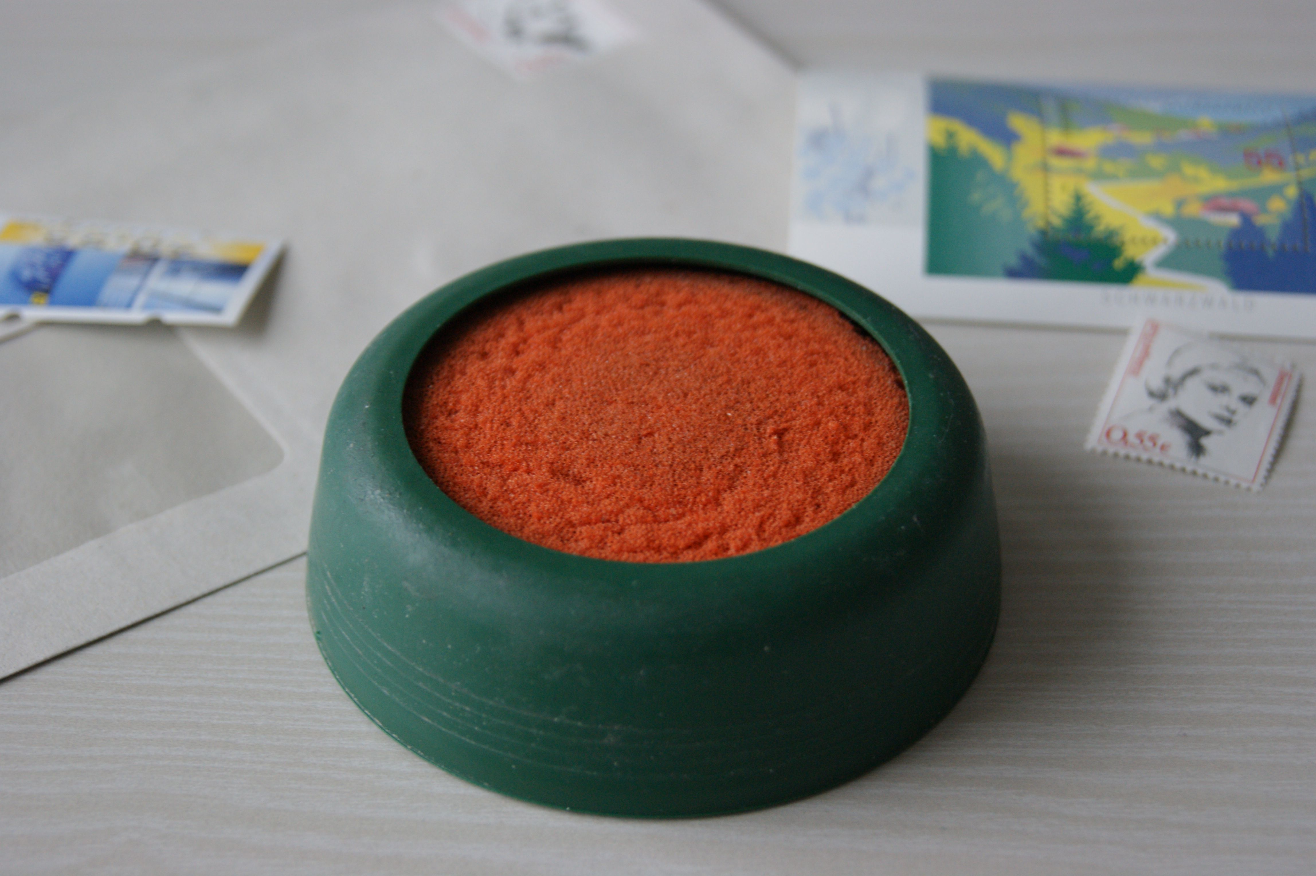 Bankanfeuchter, auch als Feuchtkissen, Fingeranfeuchter oder Anfeuchter bezeichnet